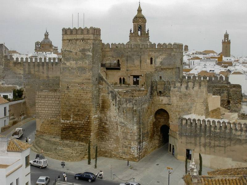 Alcázar de la puerta de Sevilla, Carmona, provincia de Sevilla, Andalucía, España.